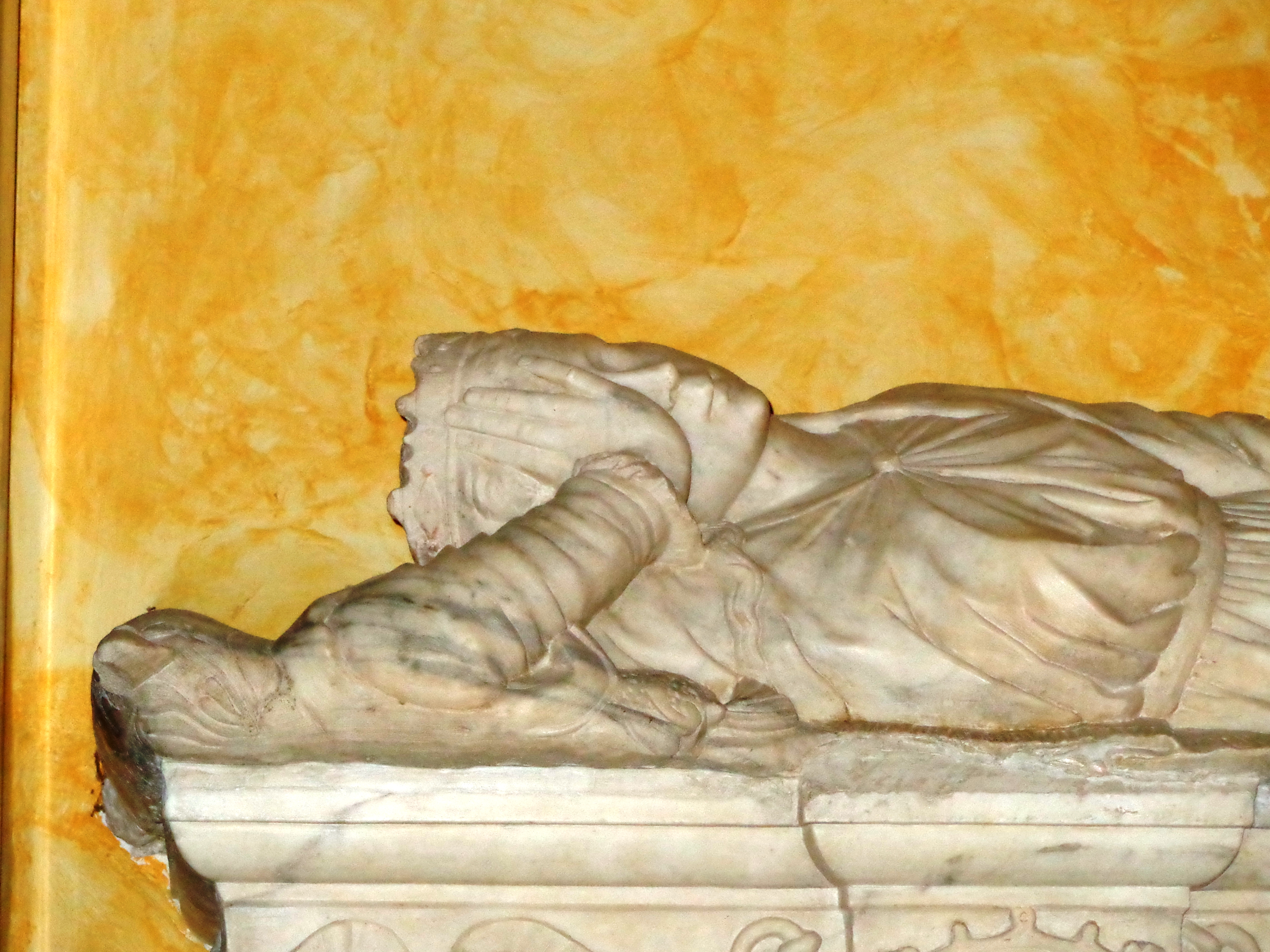 Cattedrale Patti 10